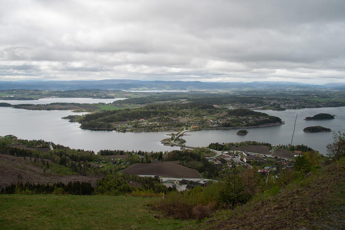 Kronprinsens utsikt på Krokskogen.